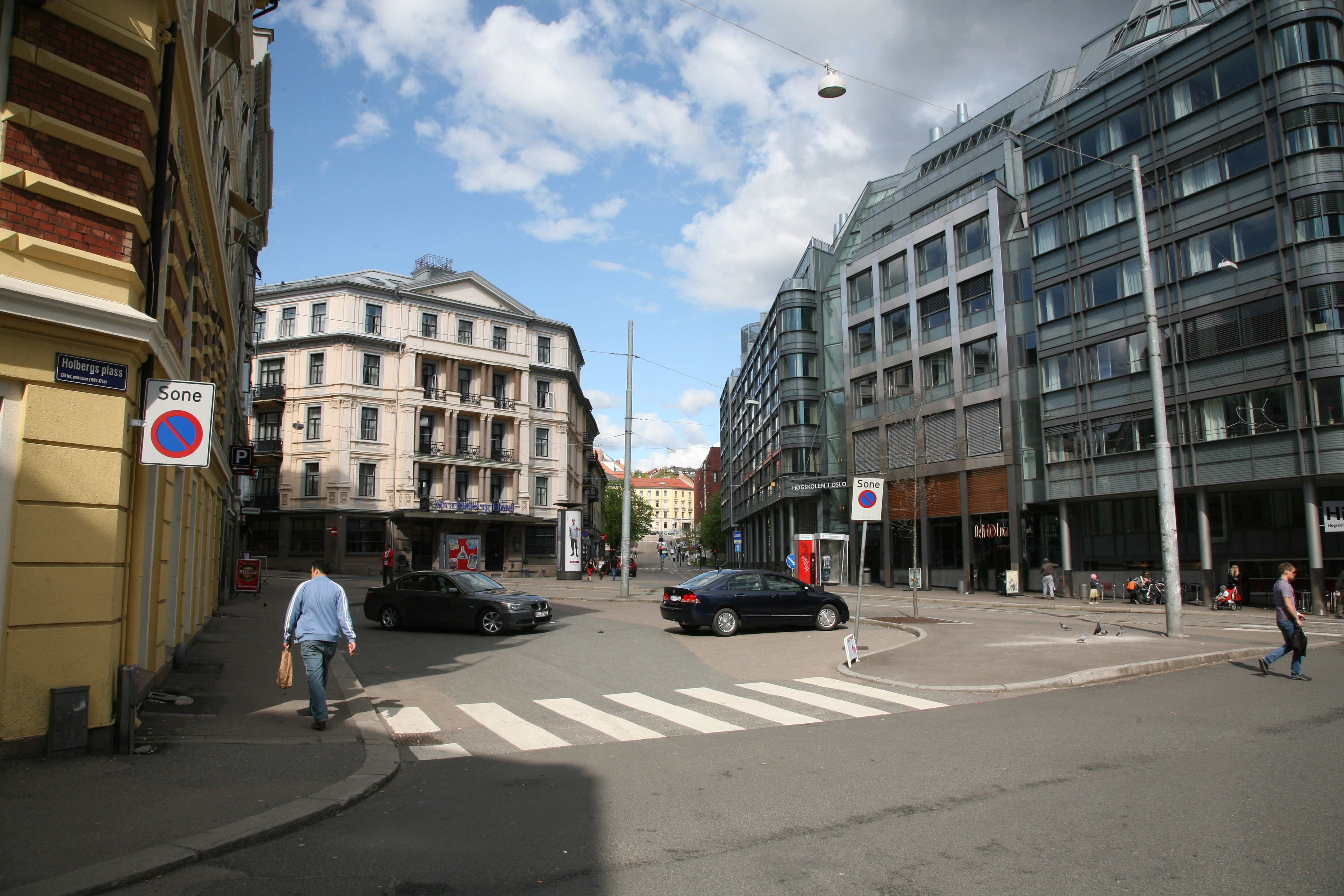 Holbergs plass in Oslo